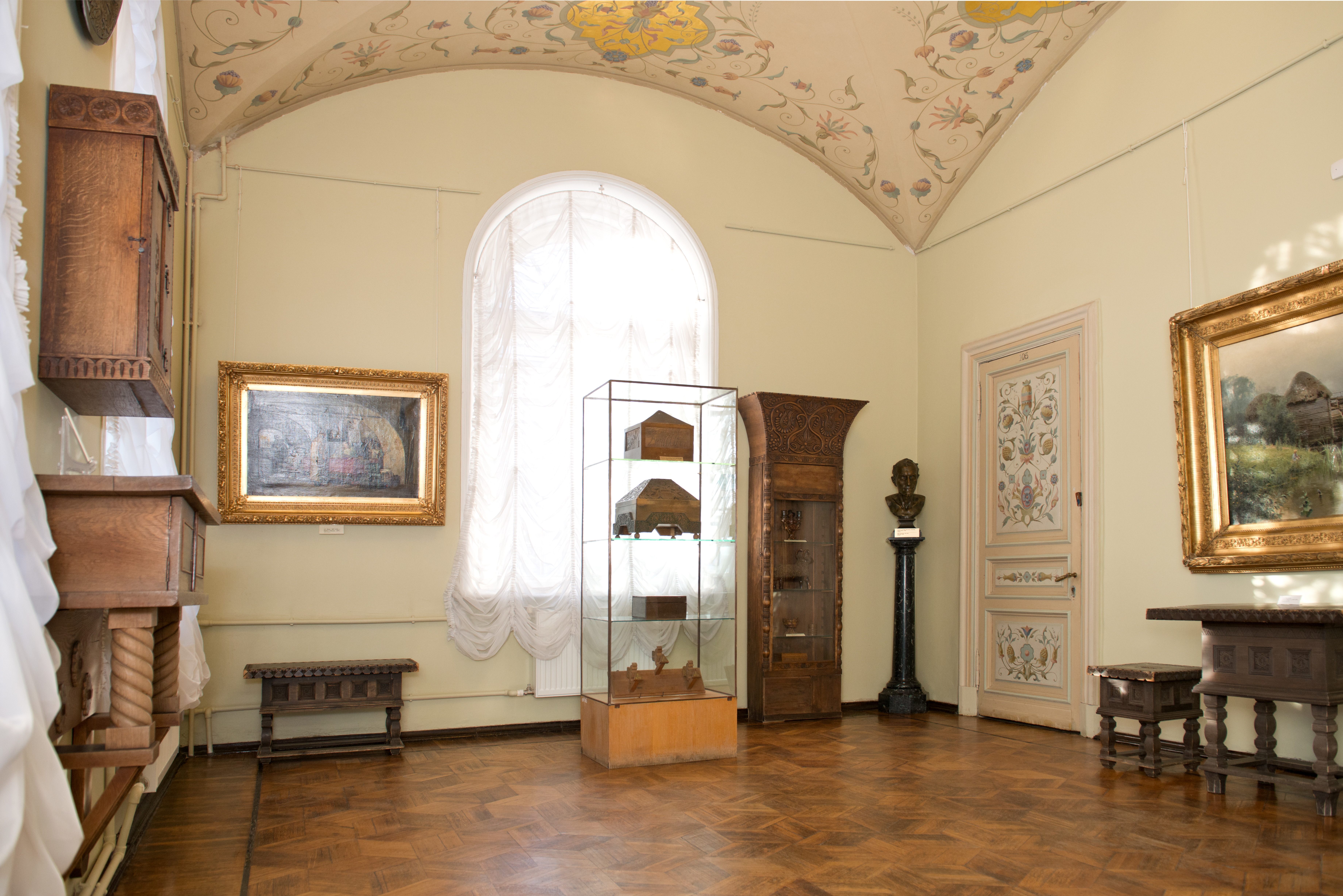 Абрамцевский зал